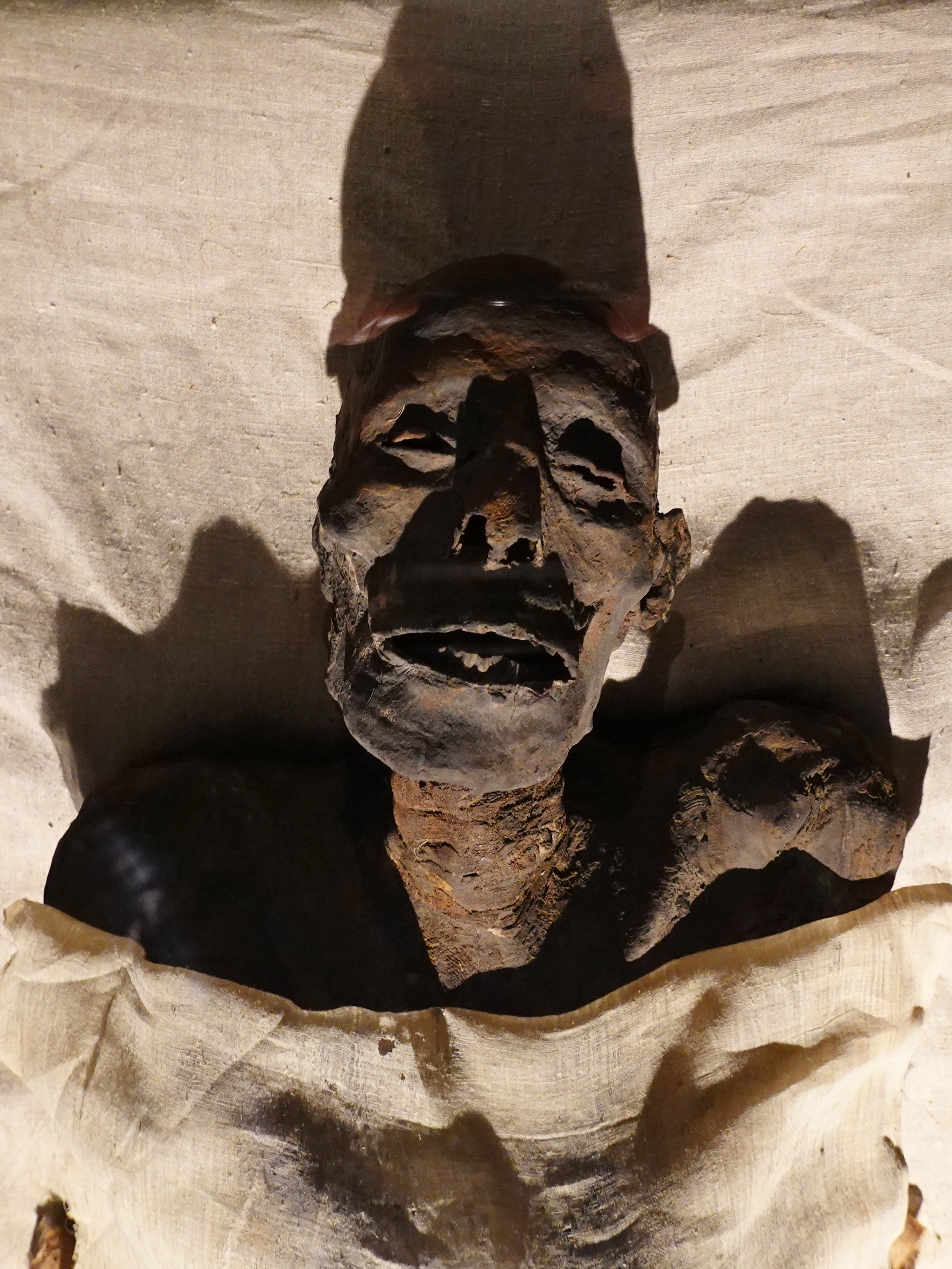 Königliche Mumie aus der späten 18. oder frühen 19. Dynastie, wahrscheinlich Ramses I., Rückgabe des Michael C. Carlos Museums in Atlanta (USA), ausgestellt im Luxor-Museum, Ägypten